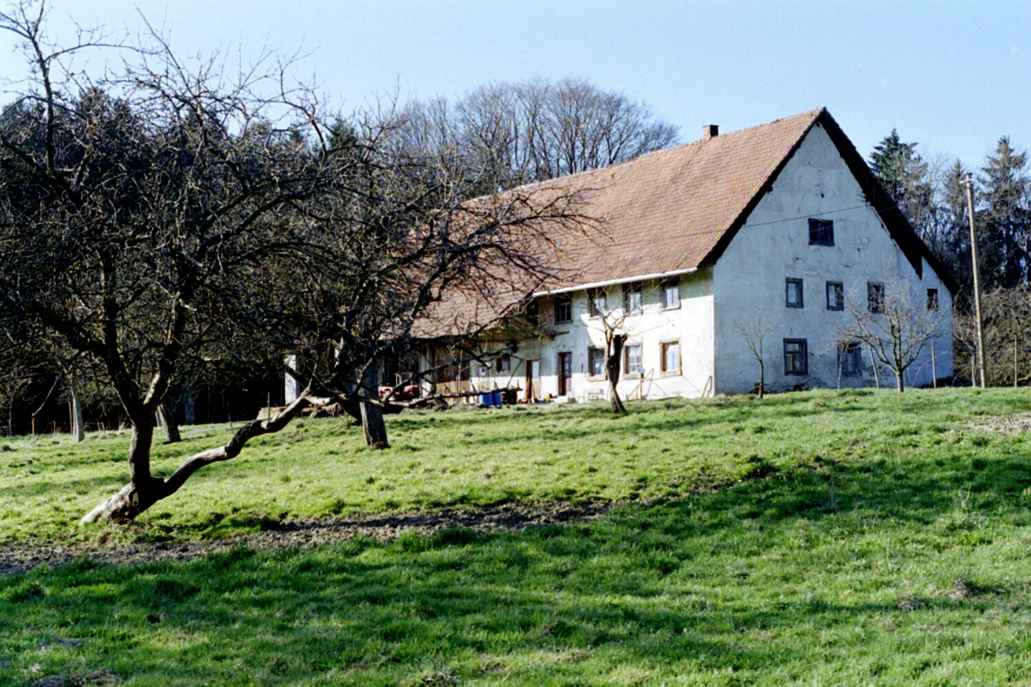 Alter Bauernhof im Klettgau (Baden-Württemberg). Er befindet sich neben einer römischen Ausgrabungsstätte (Gutshof) - Wiesenfläche im Vordergrund - und wurde vermutlich aus dessen Trümmern errichtet.